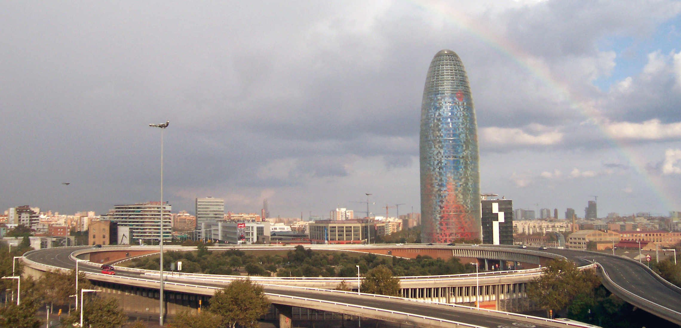 Imagen de la Plaça de les Glòries, de Barcelona.